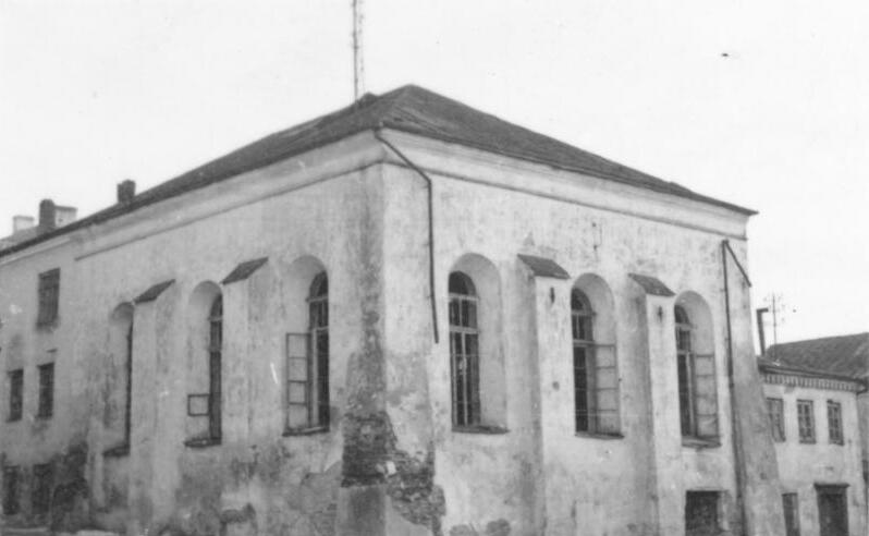 Synagoge in der Pionierstr. (ehem. Nemikstr. 1b, jetzt Teil der Leninbibliothek) Einsatzstab Reichsleiter Rosenberg für die besetzten Gebiete - Hauptarbeitsgruppe Ostland Minsk, März 1943 Foto: Dr. Nerling Film: 75/1